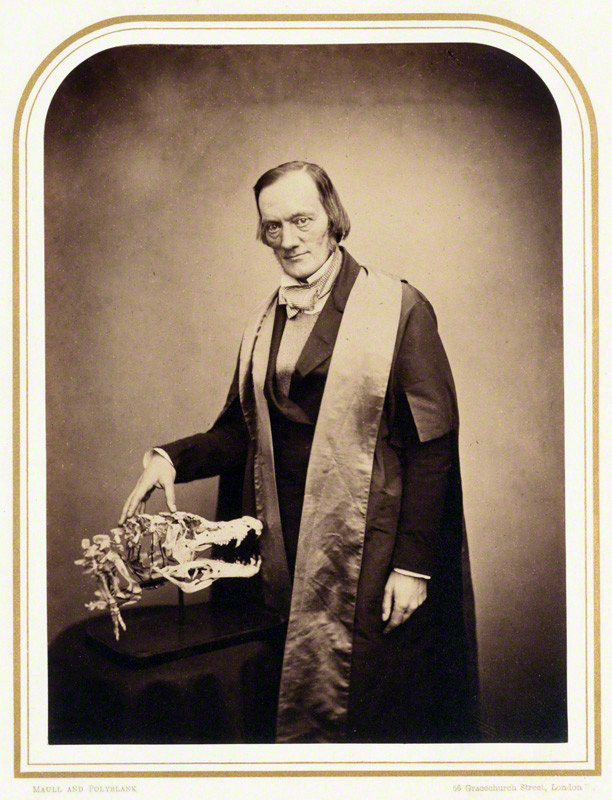 Albumen print.